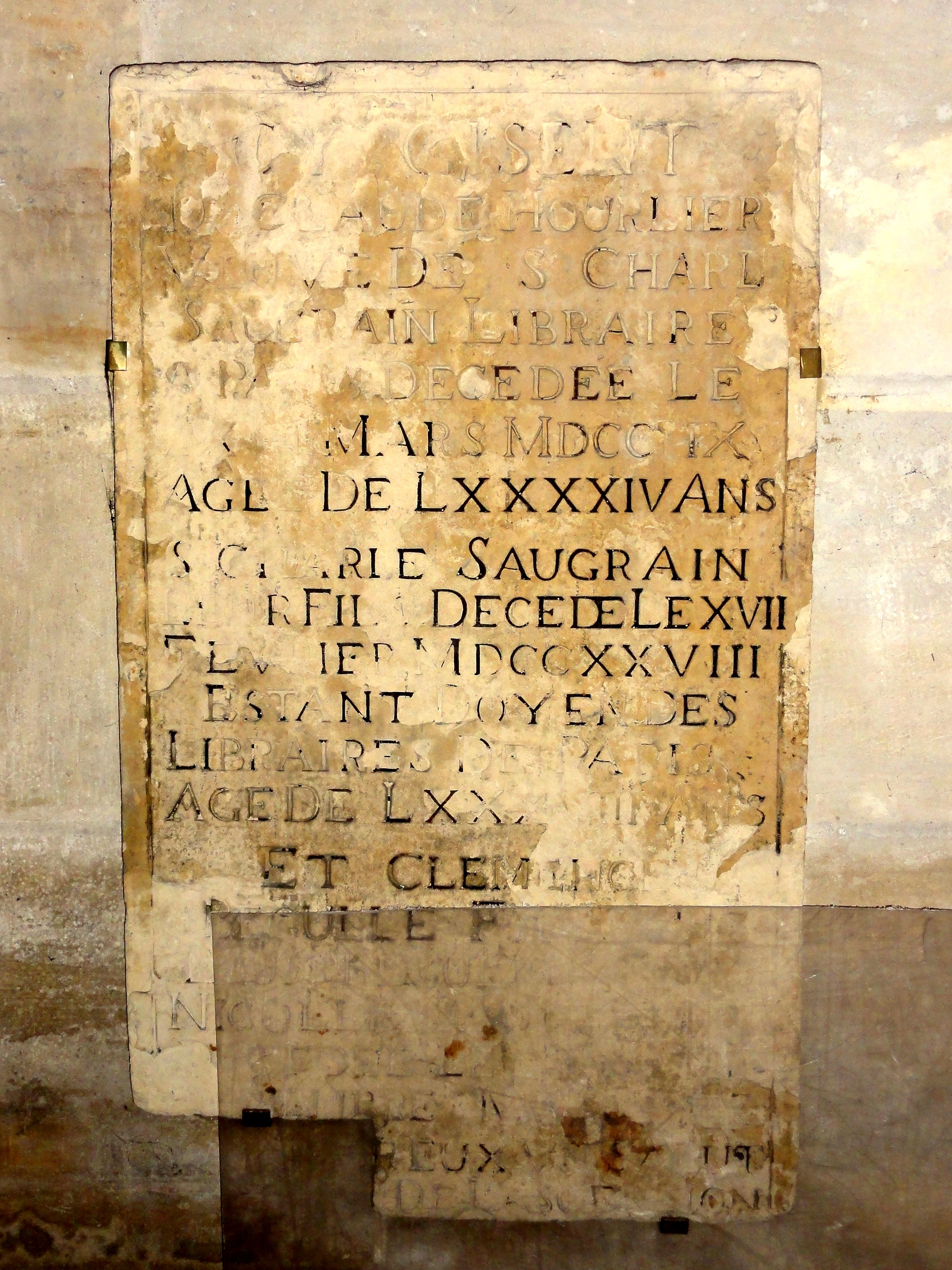 Dalle funéraire de Claude Hourlier, Charles Saugrain et Clémence Bégulle, d'une famille d'éditeurs parisiens, XVIIIe siècle.